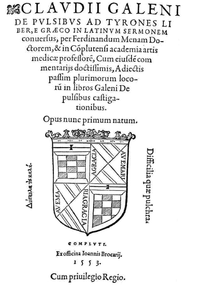 Portada del libro Claudii Galeni de pulsibus ad Tirones liber, graeco in latino sermone conversus. Publicado por Fernando de Mena en Alcalá de Henares, en 1553.